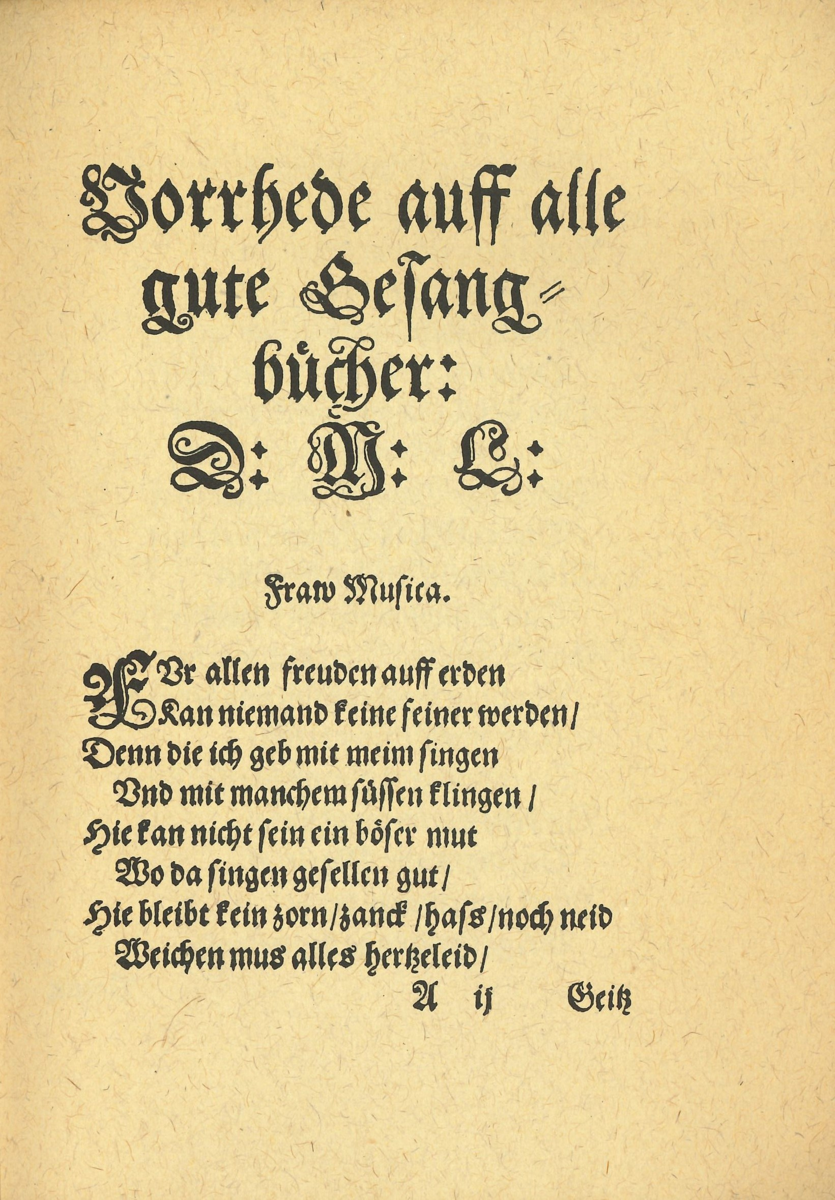 Erste Seite des Vorworts von Martin Luther in Johann Walters Publikation "Lob und Preis der löblichen Kunst Musica" von 1538. Das Gedicht ist heute als geistliches Lied unter dem Titel "Die beste Zeit im Jahr ist mein" bekannt. Achtung: Der vorliegende Scan wurde nicht anhand des Originals, sondern der Faksimile-Ausgabe von 1938 angefertigt.